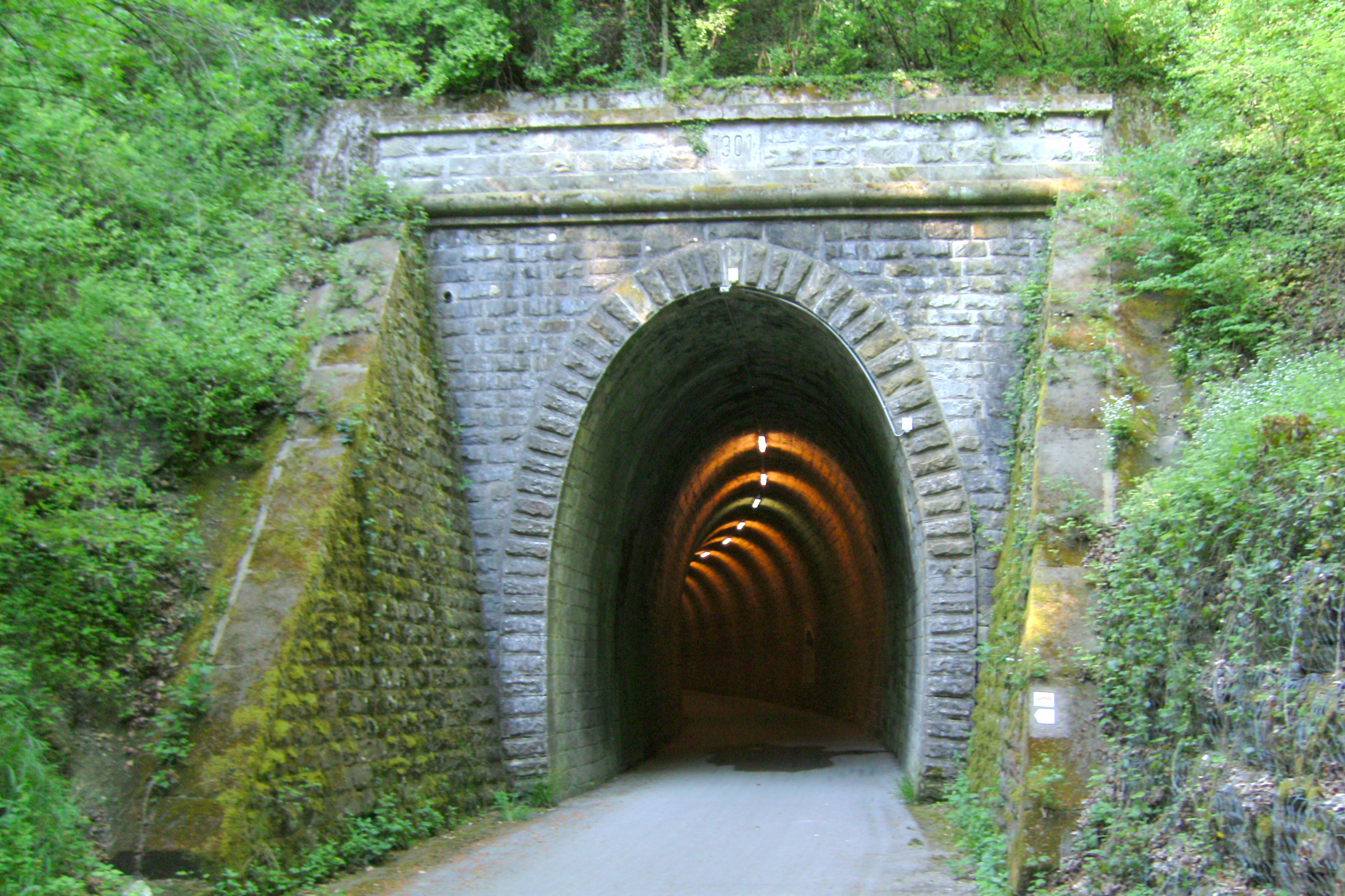 Chareli-tunnel zu Bech, elo eng Vëlospist